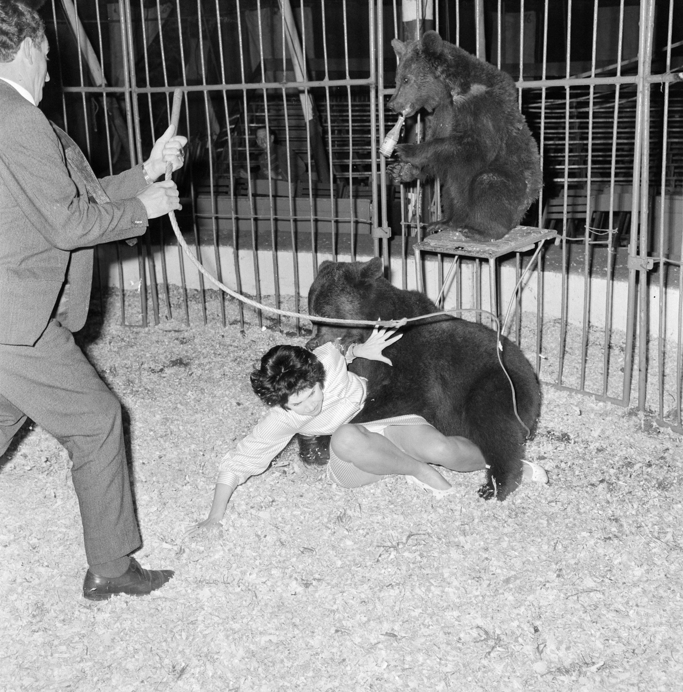 In 1962 wint Cees de Boer de prestigieuze World Press Photo in de categorie nieuws. Hij wint de prijs met een foto van zangeres Ria Kuyken die tijdens een generale repetitie in Circus Toni Boltini wordt aangevallen door een beer. Dit is de reeks foto's die voor en na de aanval zijn genomen